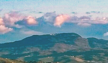 Montagna di Trevico